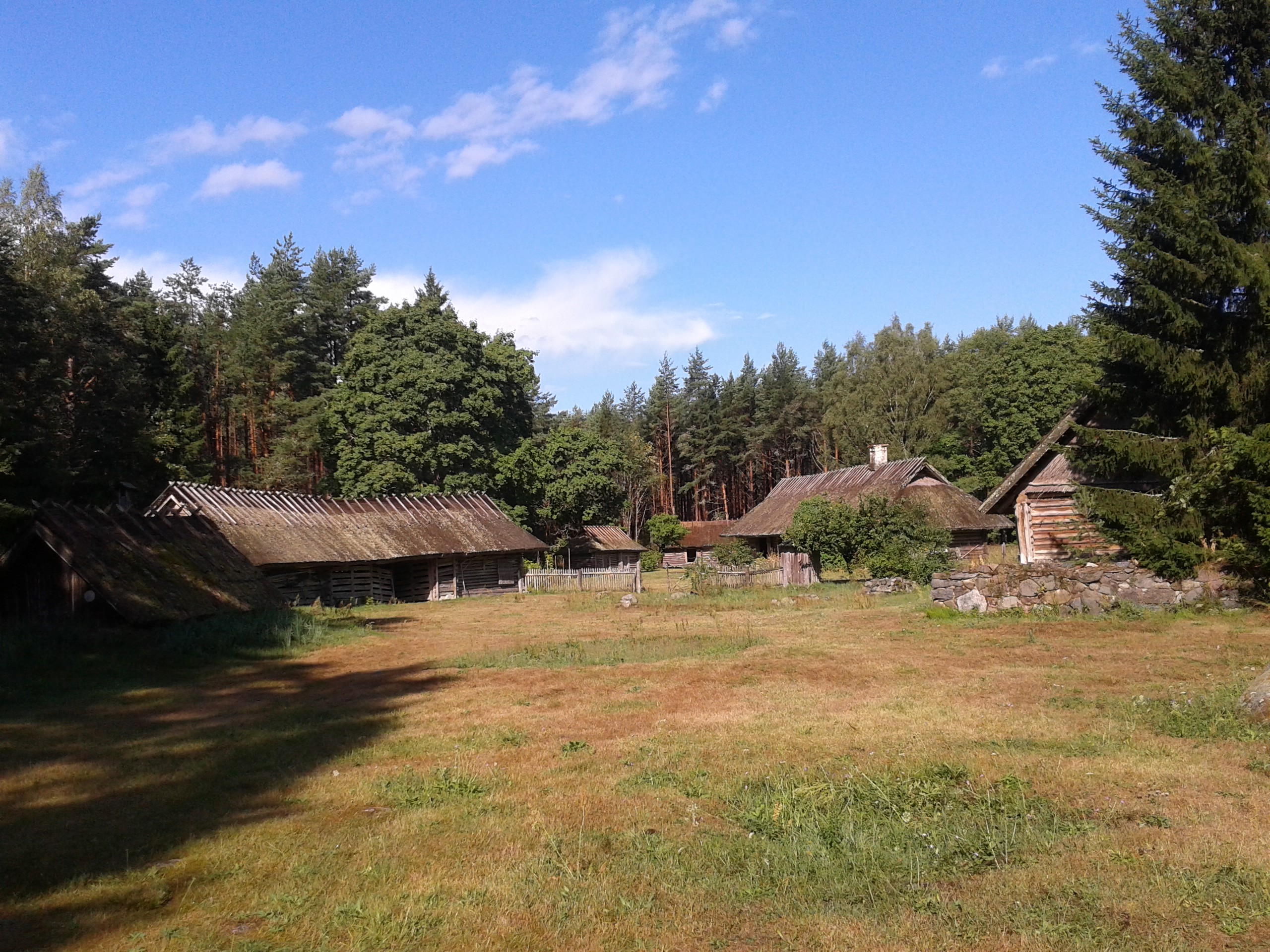 Pildil vaade muuseumile saun-paargu poolt.